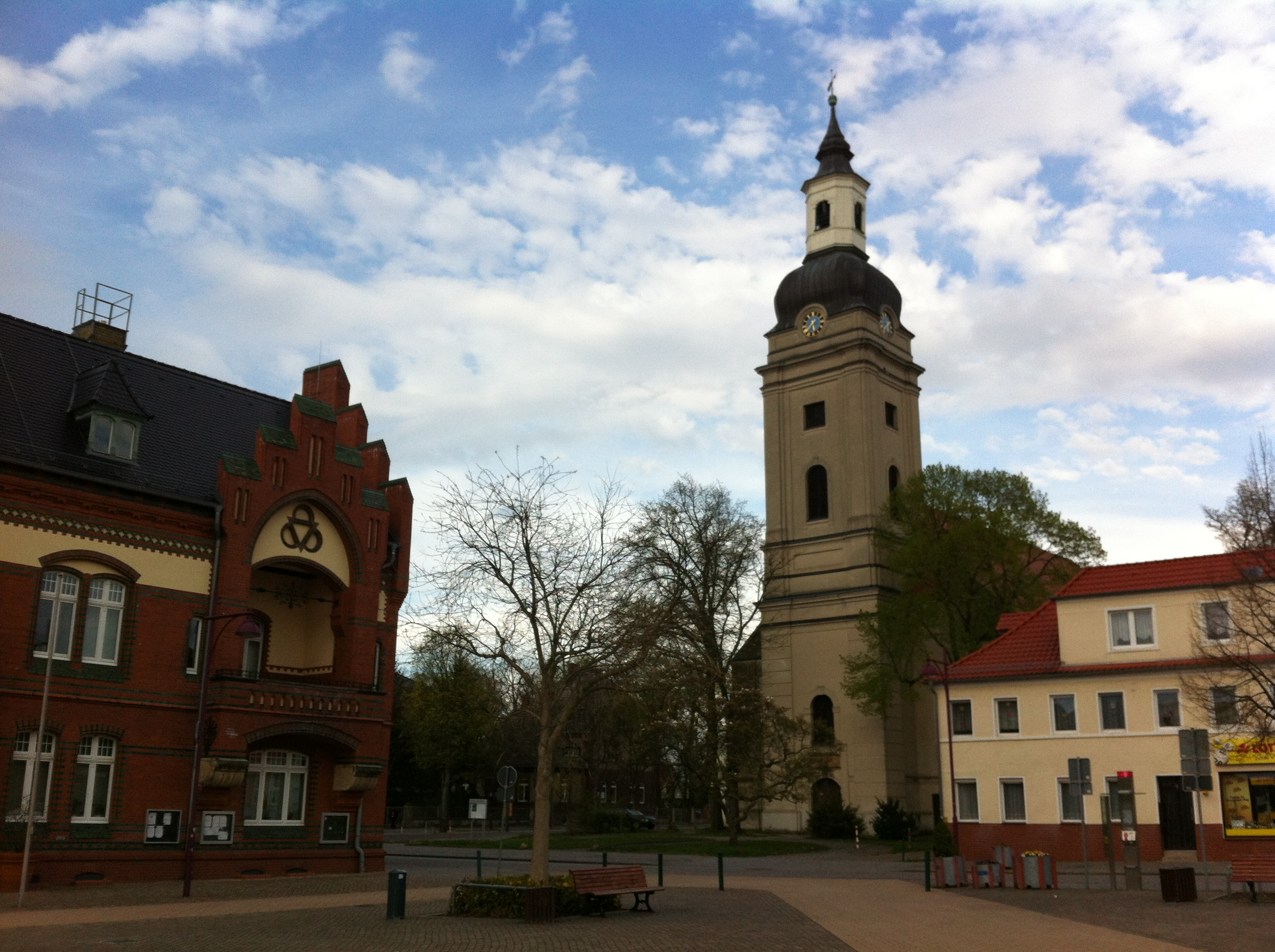 Stadtkirche St. Trinitatis (Genthin) vom Marktplatz gesehen, rechts angeschnitten das Rathaus